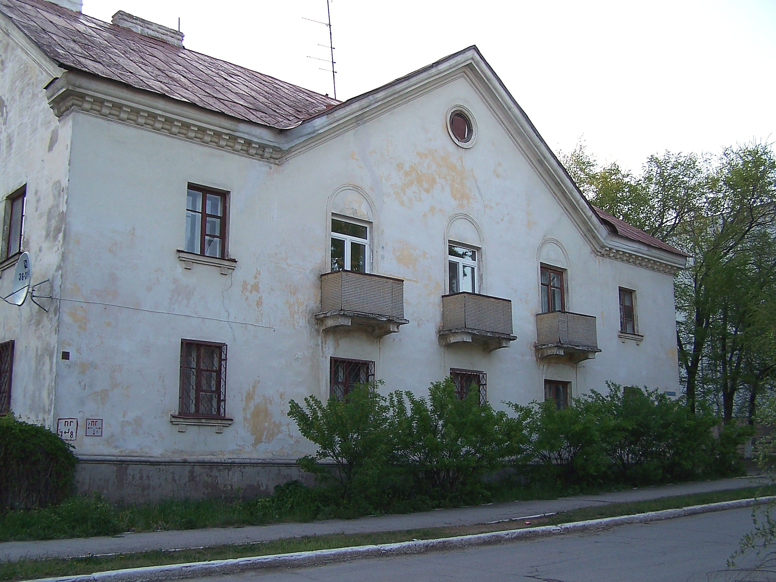 Жилой дом: улица Тюленина, 3, Тольятти, Самарская область